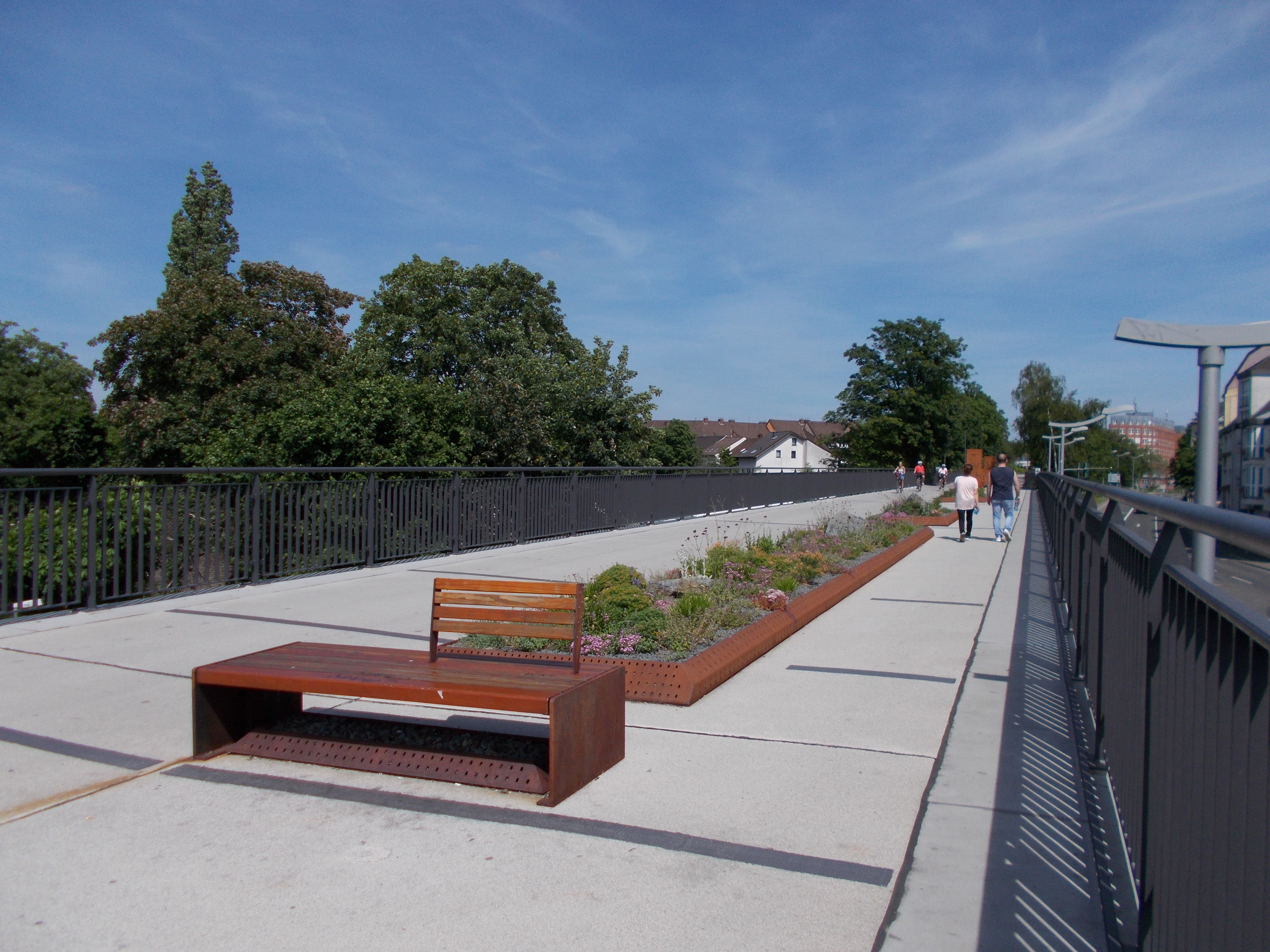 2019 - Radschnellweg RS1 / Hochpromenade, Mülheim an der Ruhr Stadtmitte. Die Blumenkästen, Sitzbänke und Deko aus Cortenstahl trennen Radweg von Fußweg.